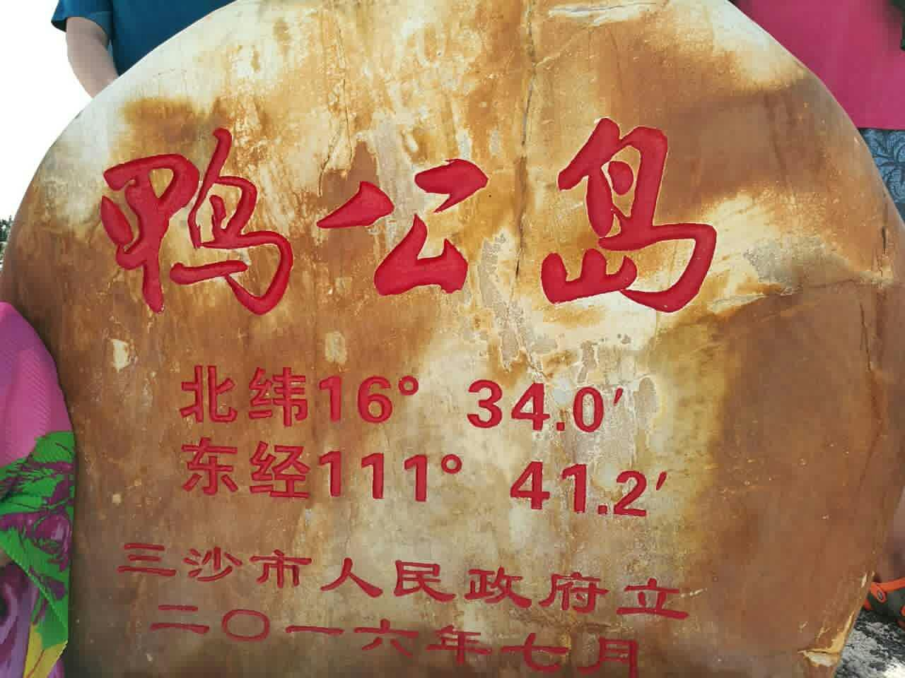 鸭公岛主权碑